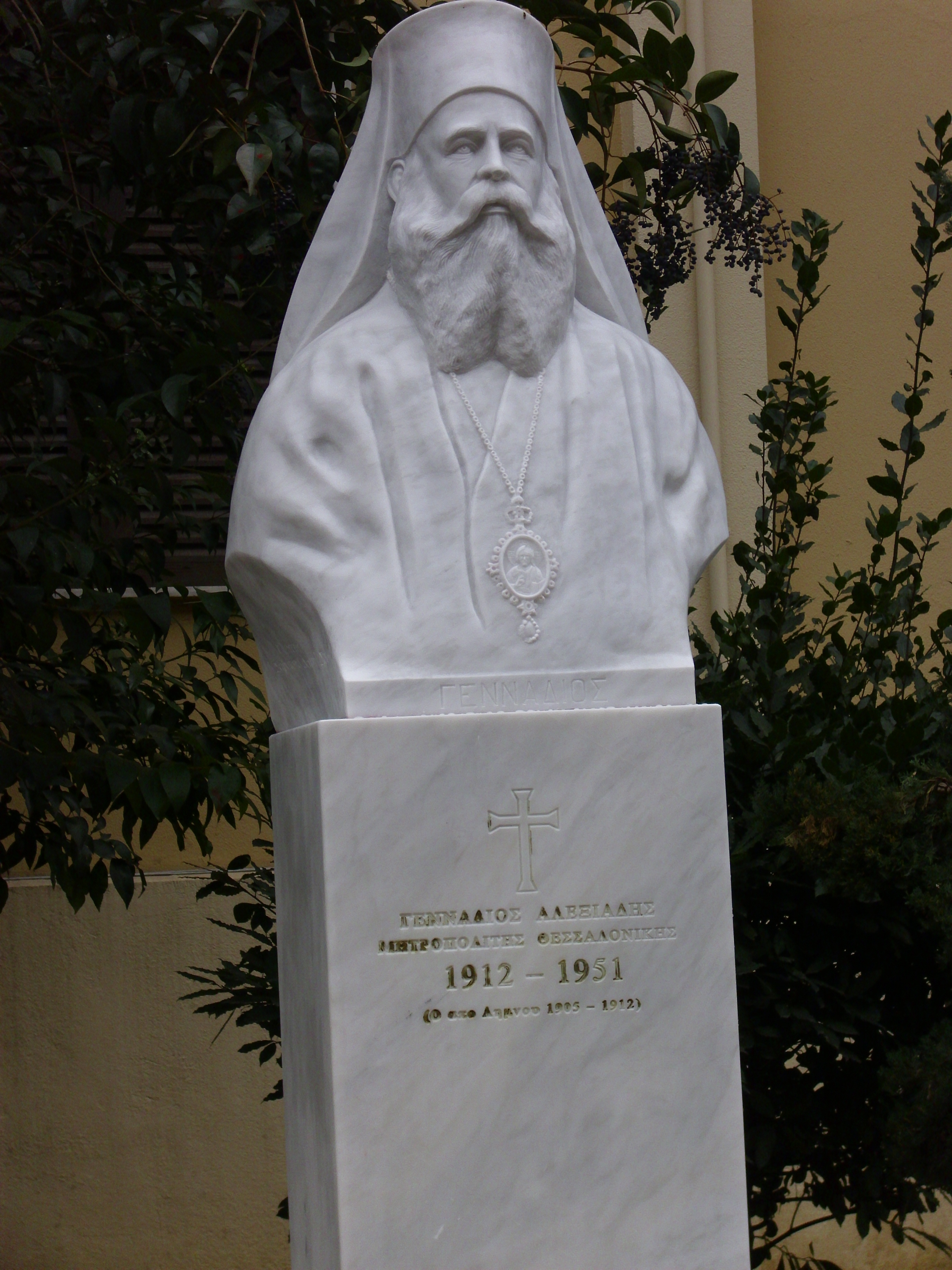 Статуя на солунския митрополит Генадиос Алексиадис в Солун.